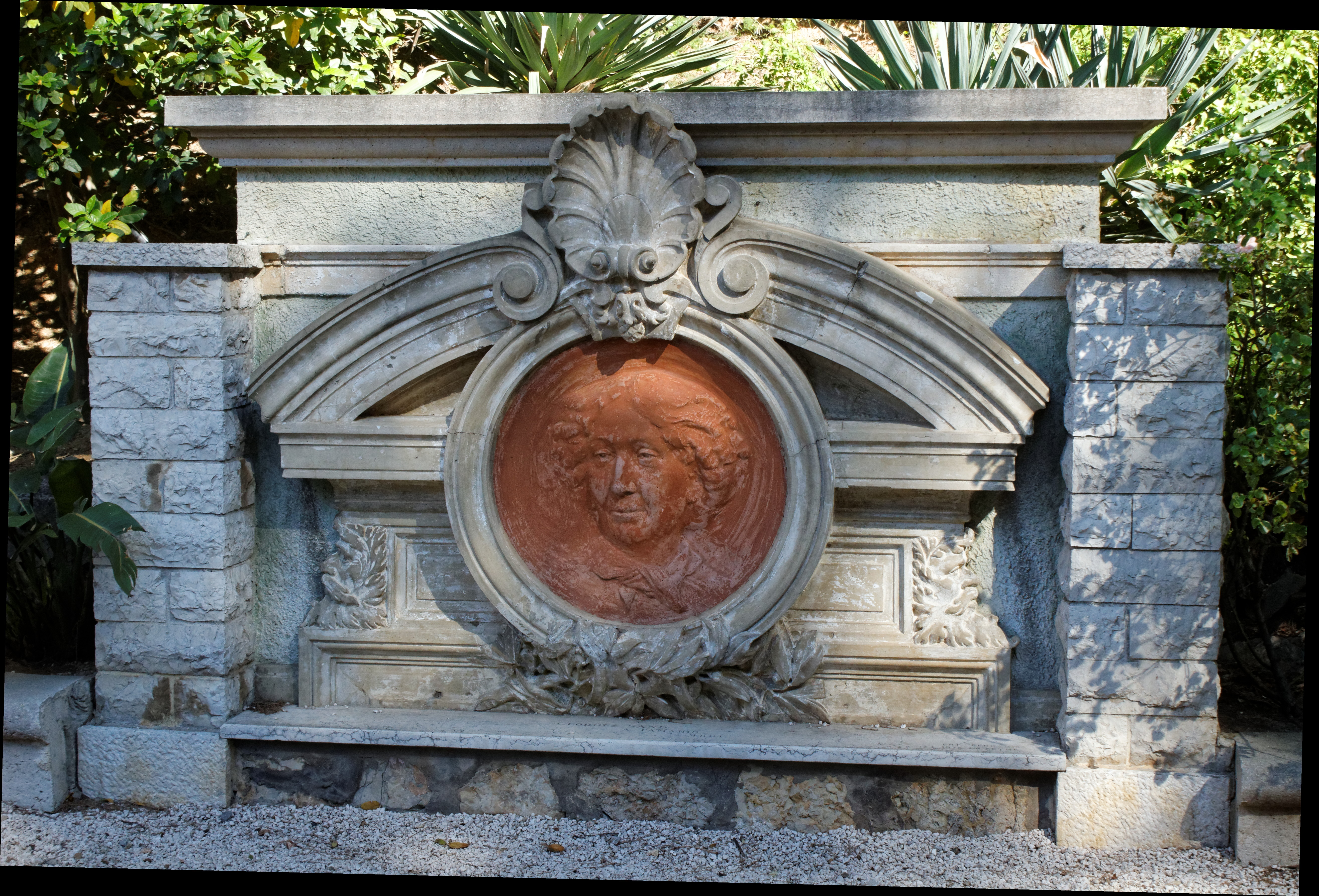 Médaillon en terre cuite représentant George Sand. Apposé en 1891 sur la demeure où elle séjourna à tamaris. Déposé au fort de Balaguier après la démolition de la demeure